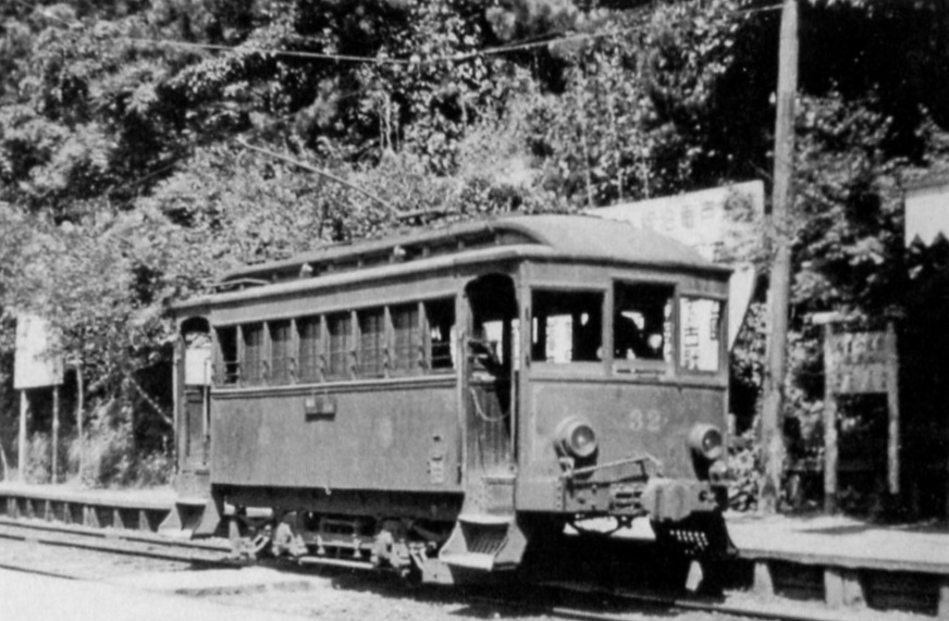 テ28形32。お堀の中の大津町駅で発車待ち。